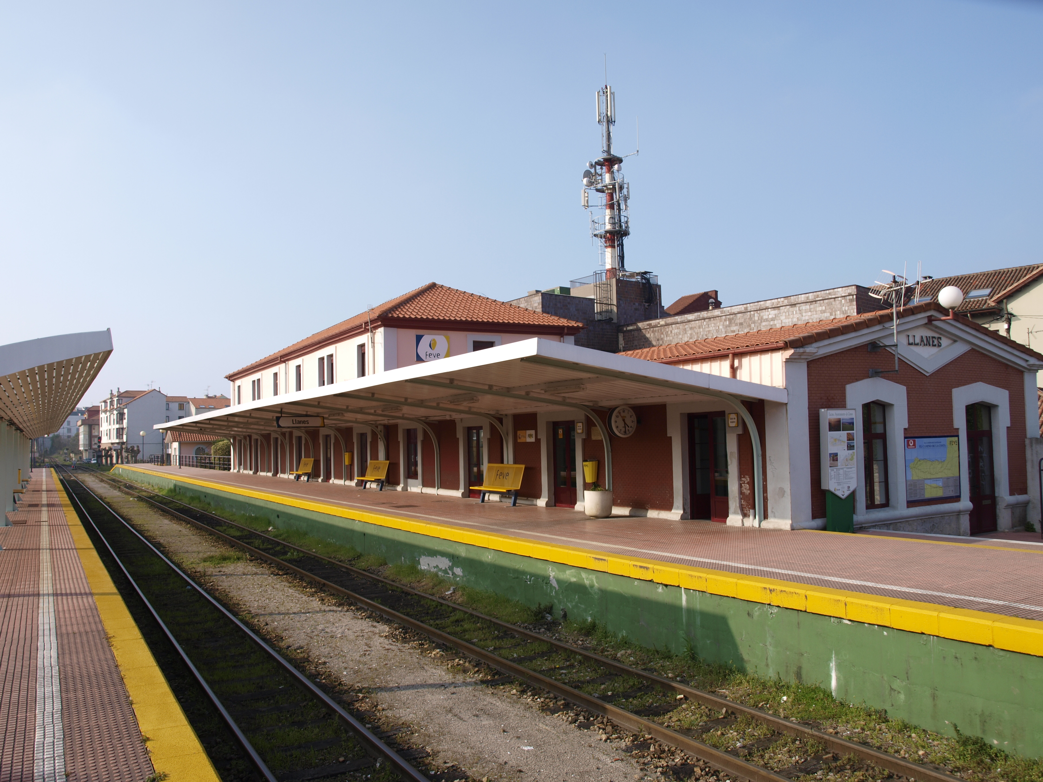 Estación Feve Llanes